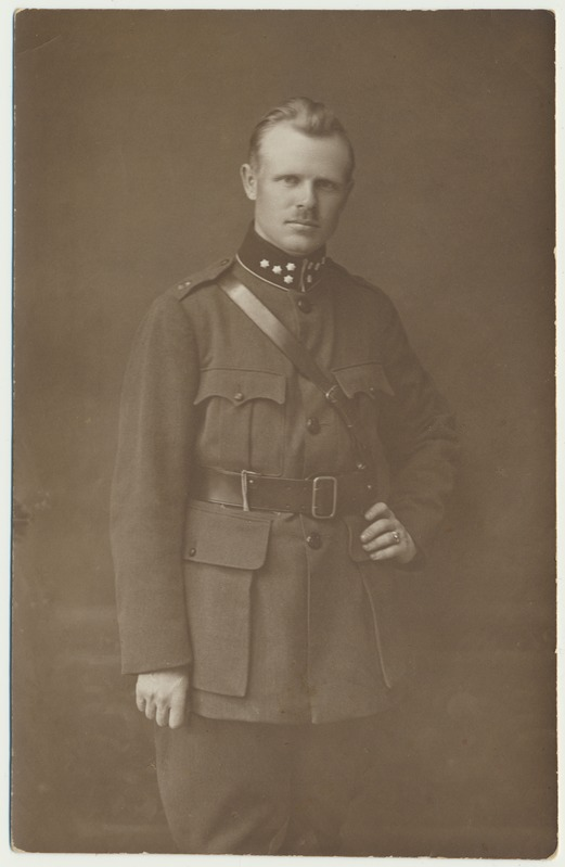 Kapten Aleksander Jaakson 1920